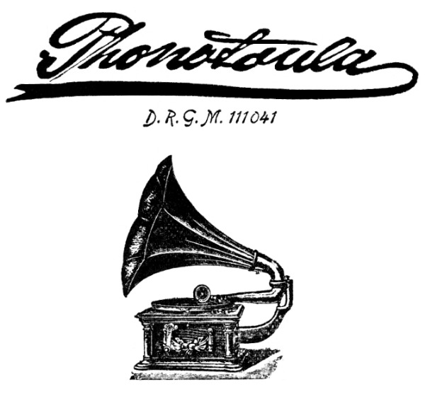 Phonotoula-Schriftzug (D.R.G.M. 111041) und Grammophon-Abbildung. – Phonotoula war eine von Langenscheidt geschützte Bezeichnung für eine akustische Sprachunterrichtsart und die entsprechenden Grammophon-Sprachplatten, die ab 1905 die Sprachlernbriefe nach der Methode Toussaint-Langenscheidt ergänzten.